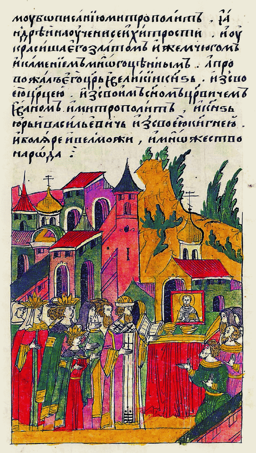 Лицевой летописный свод "[Об отправке иконы чудотворца Николы Великорецкого. В том же месяце в 3 день была отправлена в Вятку обновленная икона Николы Великорецкого, а обновлял ее сам Макарий, митрополит всея Руси, и Андрей, протопоп Благовещенский, так как иконно]му мастерству были научены митрополит и Андрей. И украсили ее золотом и жемчугом, и драгоценными камнями, а провожал икону царь и великий князь со своей царицей, и со своим сыном царевичем Иваном, и князь Юрий Васильевич со своей княгиней, и бояре, и вельможи, и множество народа"